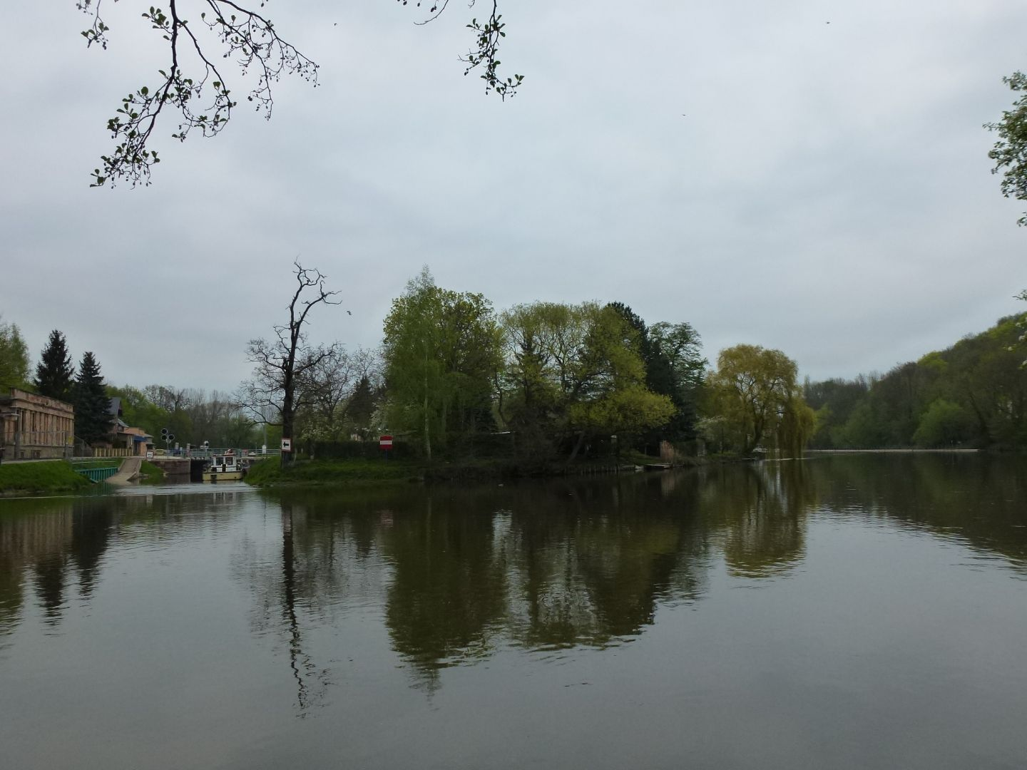 Untere Schleuse in Weißenfels, Herrenmühlenschleuse